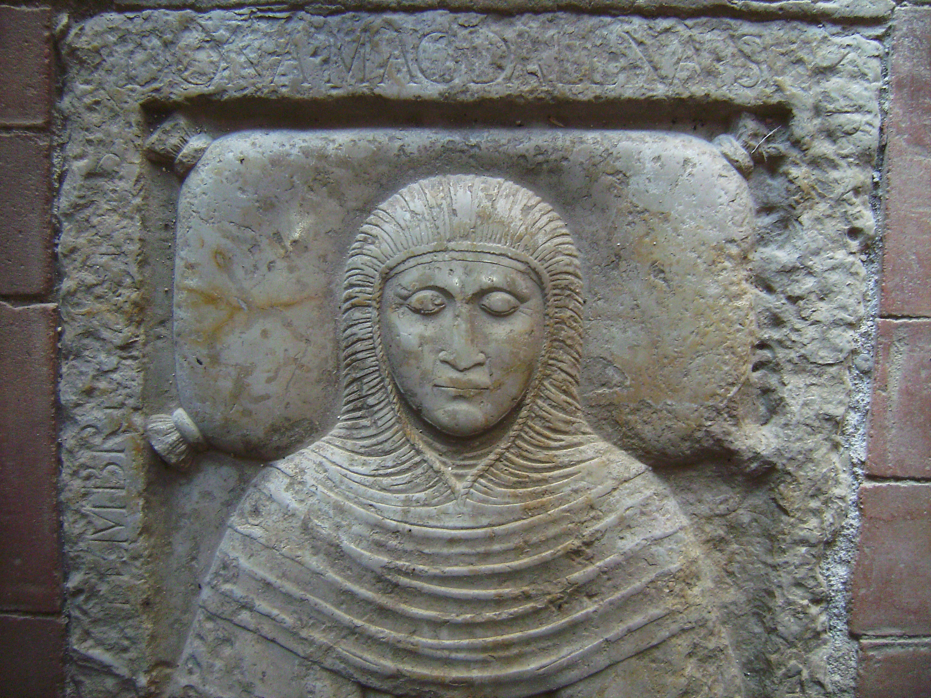 Real Monasterio de Santes Creus - Sepulcro de Magdalena Salva de Valls 1